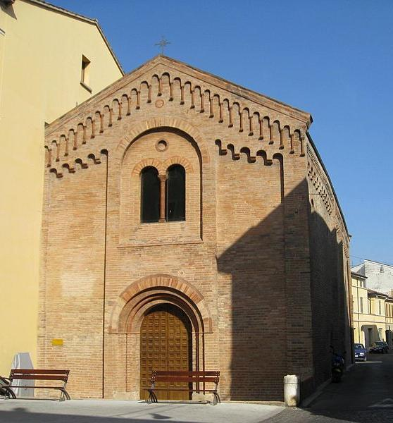 Chiesa di Sant'Antonio Vecchio a Forlì, foto propria